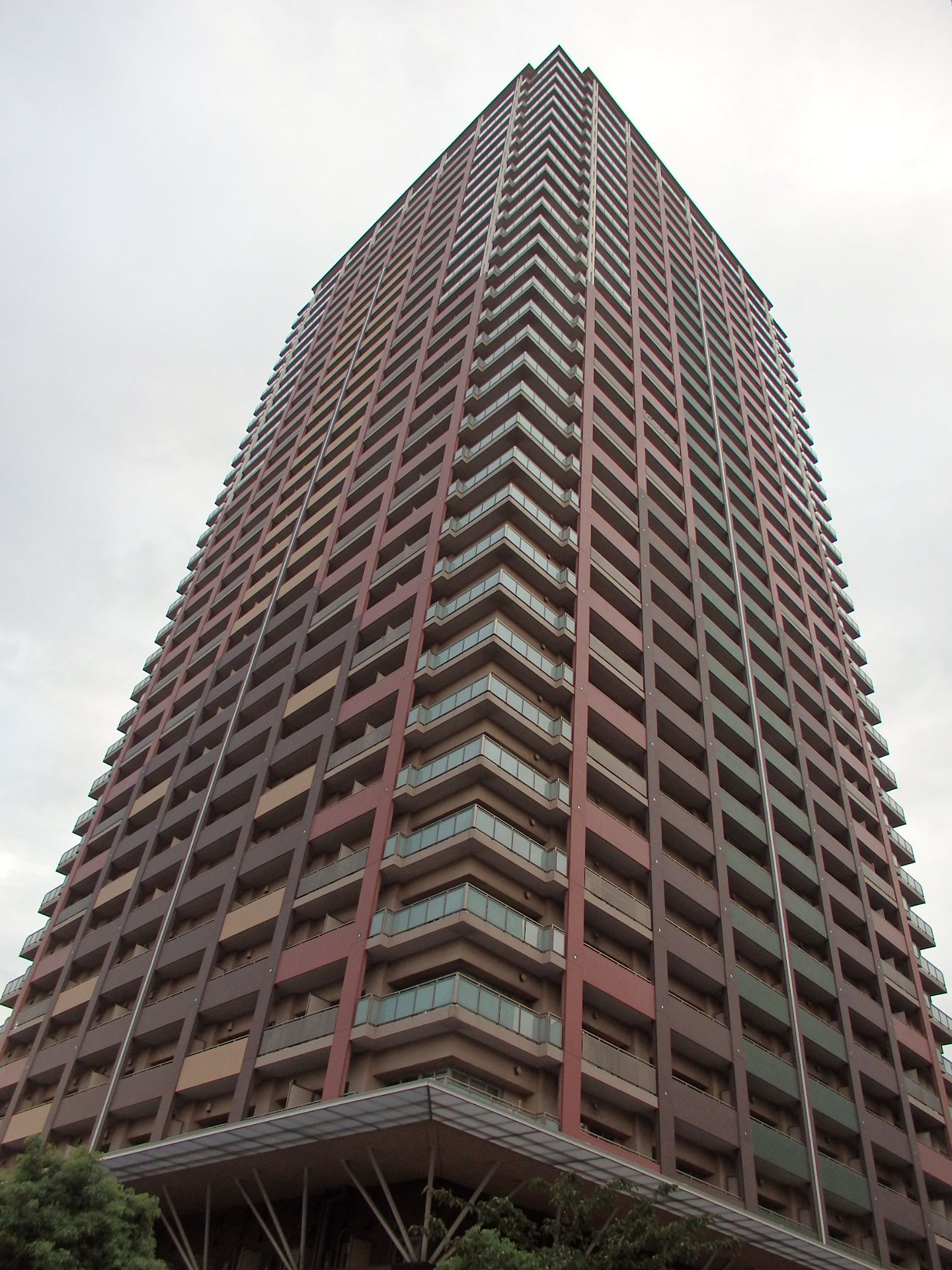 オーベルタワー川口コラージュ